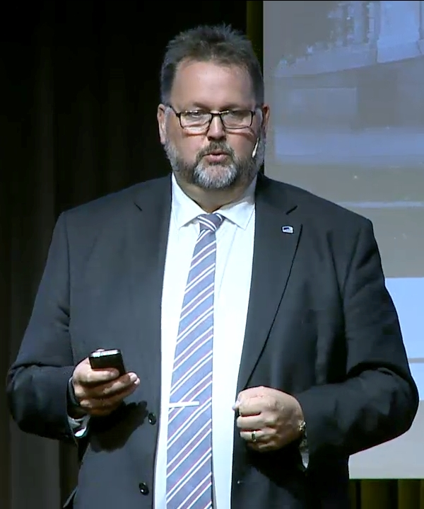 Svein Harberg (født 30. juli 1958 i Bergen) er en norsk politiker (H) som siden oktober 2013 leder Stortingets familie- og kulturkomite.